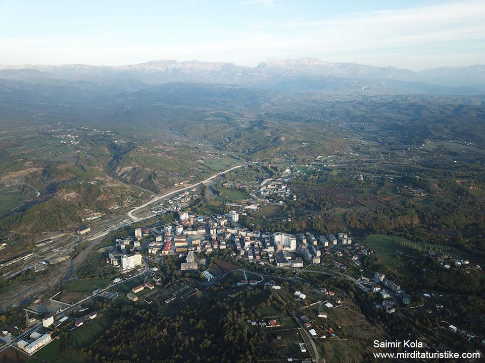 Qyteti i Rrësheni fotografuar me dron nga Saimir Kola Ndalohet përdorimi i fotos pa aprovimin e autorit